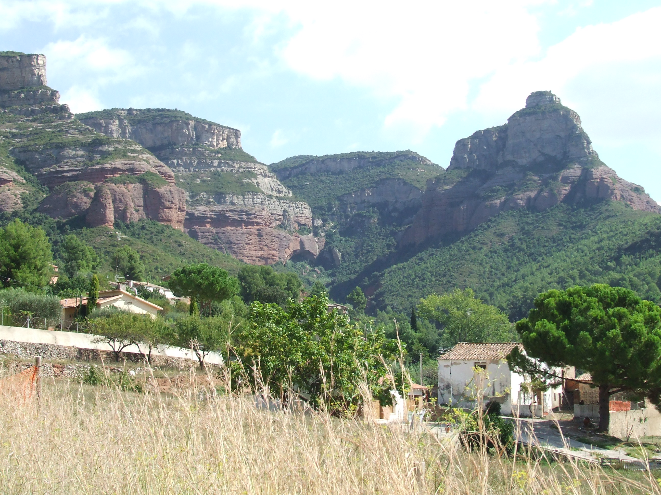 Vall del torrent de Llòbrega, Cingles de Bertí i Turó de les Onze Hores (Riells del Fai, Bigues i Riells, Vallès Oriental)